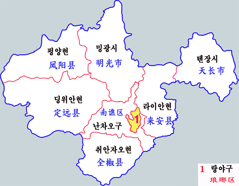 추저우시 현급구역